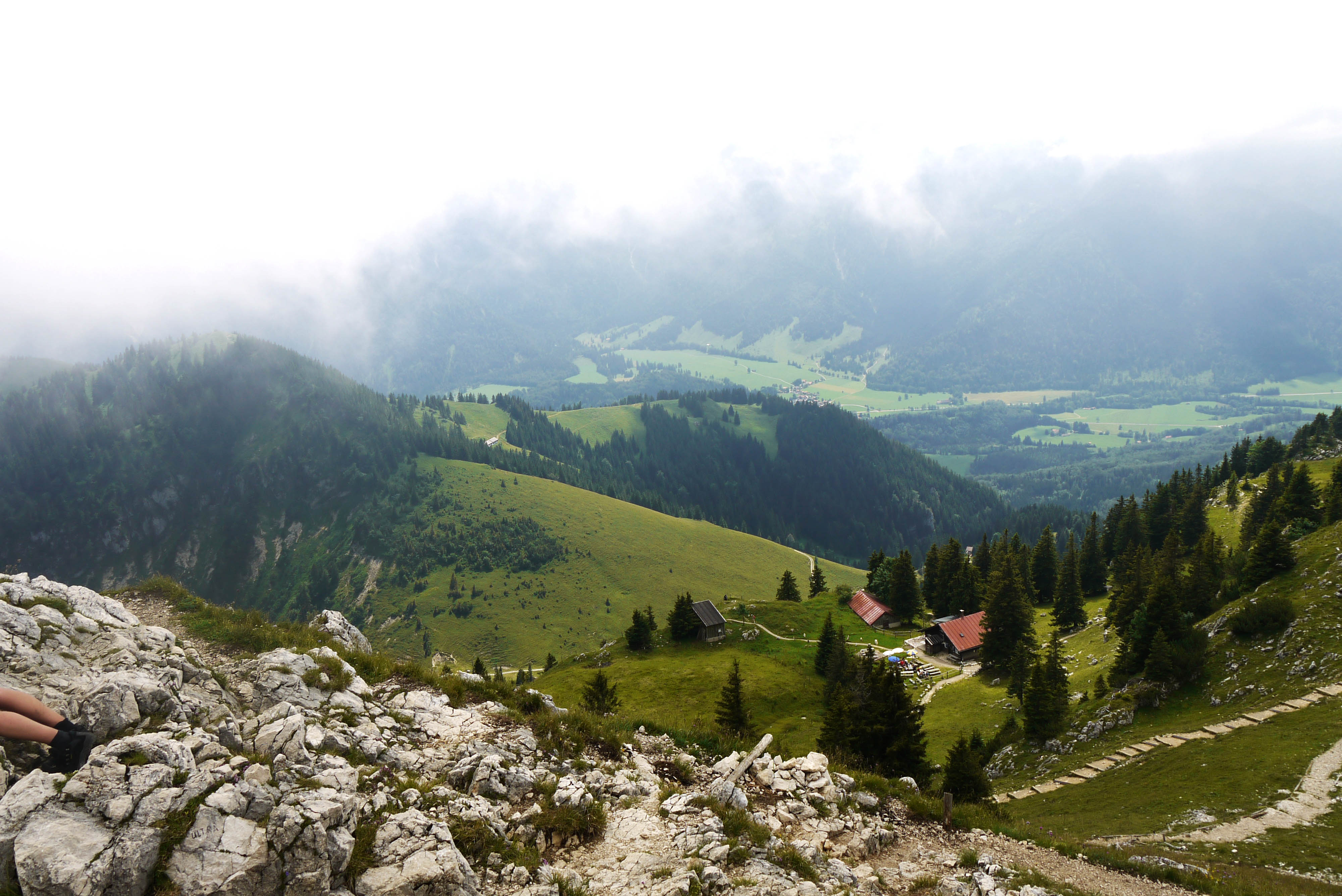 Blick vom Breitenstein